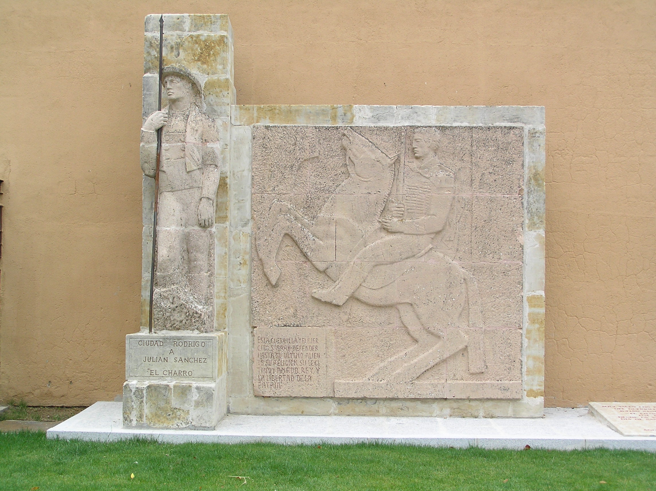 Tumba de Julián Sánchez el Charro. Ciudad Rodrigo (provincia de Salamanca, España)